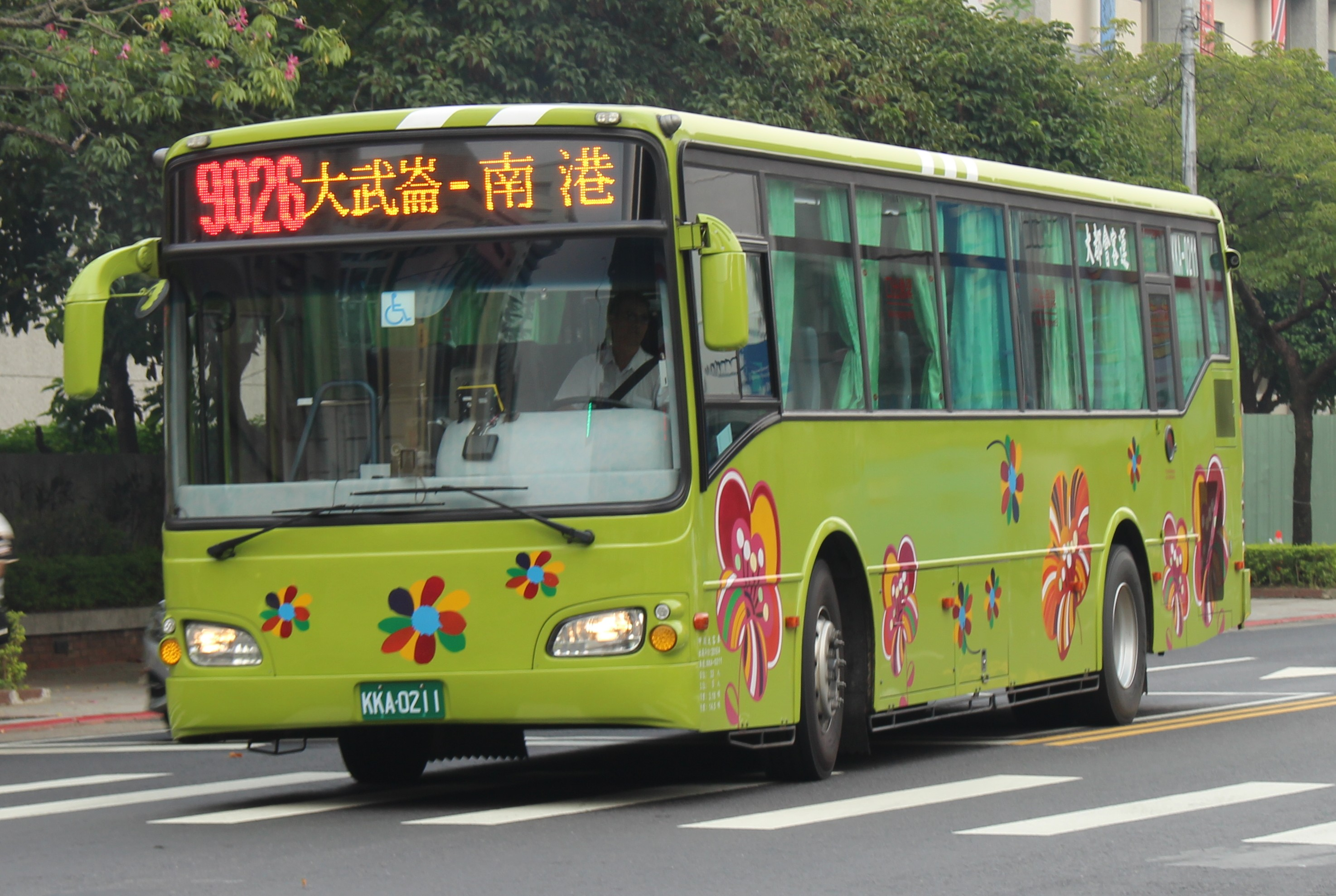 大都會客運 KKA-0211 國道復康巴士